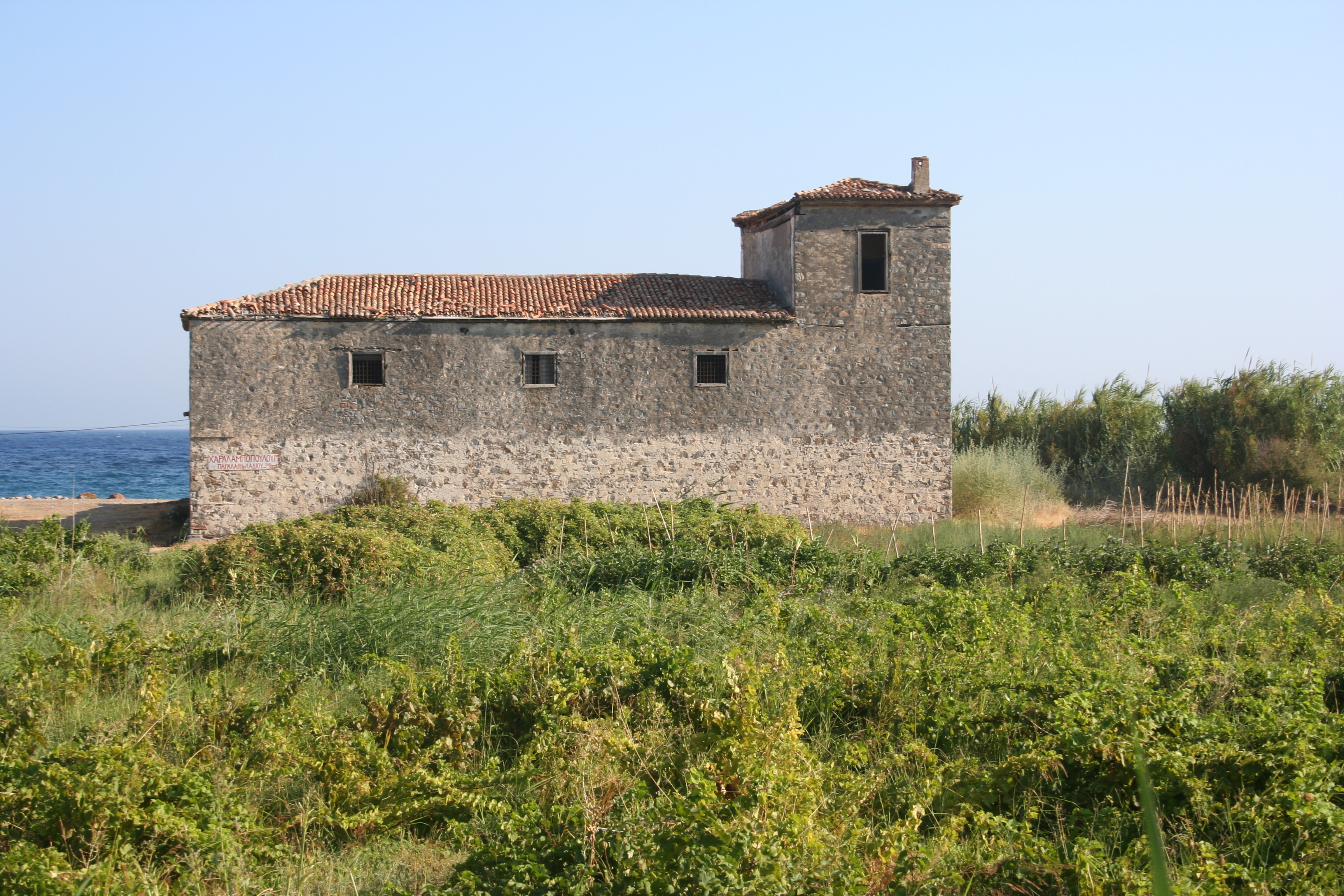 Η ταβέρνα (αποθήκη κρασιού) του Αριστείδη Φώλα στην ανατολική άκρη του Αγίου Κωνσταντίνου Σάμου.